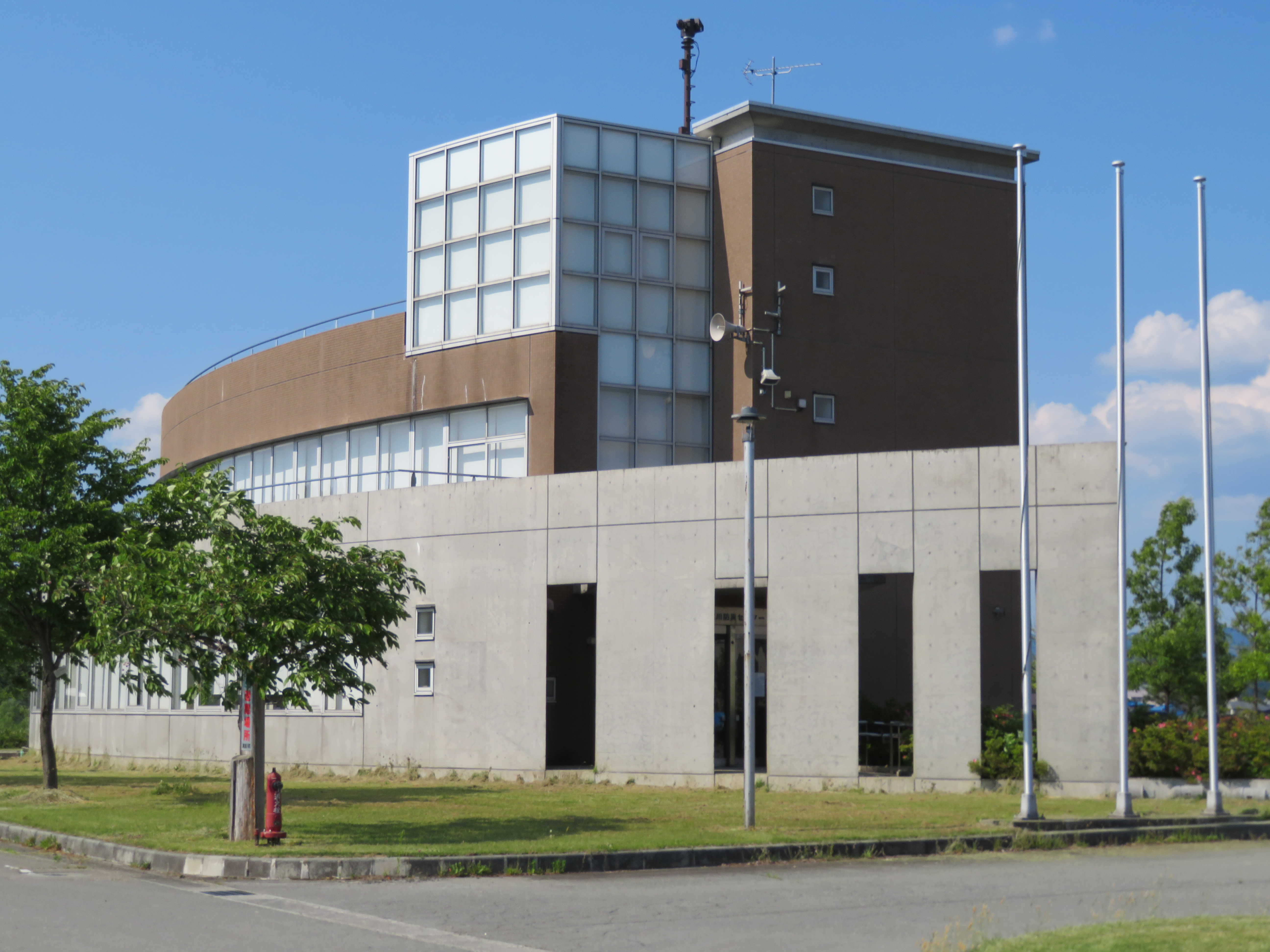 山形県最上郡真室川町に所在する真室川防災センター